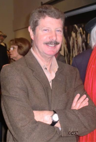 O Historiador Emanuel Janes foto de perfil.